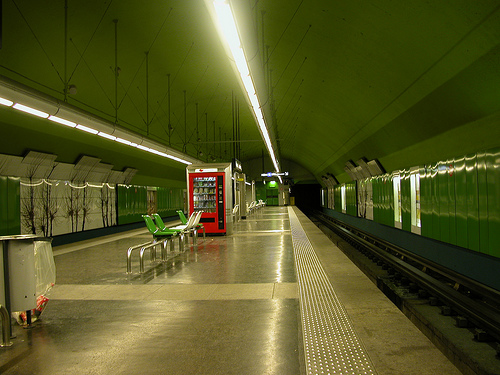 Station "Reformés - Canebière" de la ligne 1 du métro de Marseille.